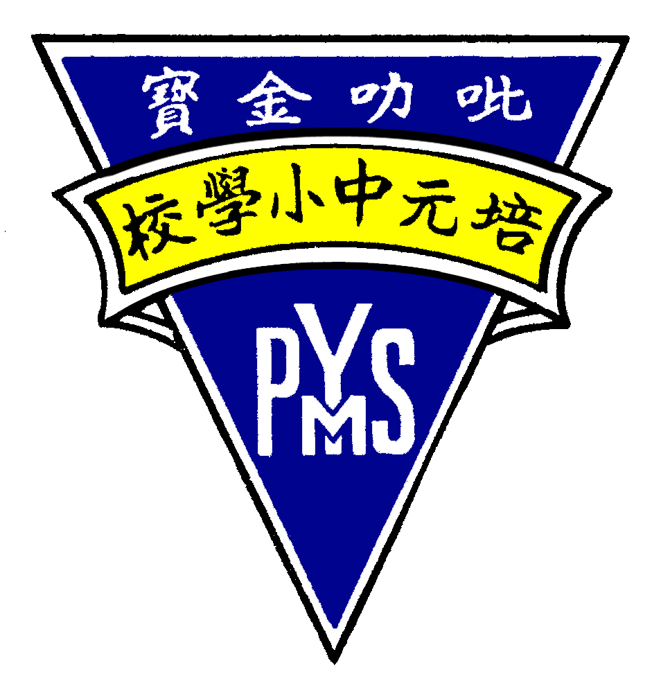 培元独中校徽，从1912年开始使用至1973年。